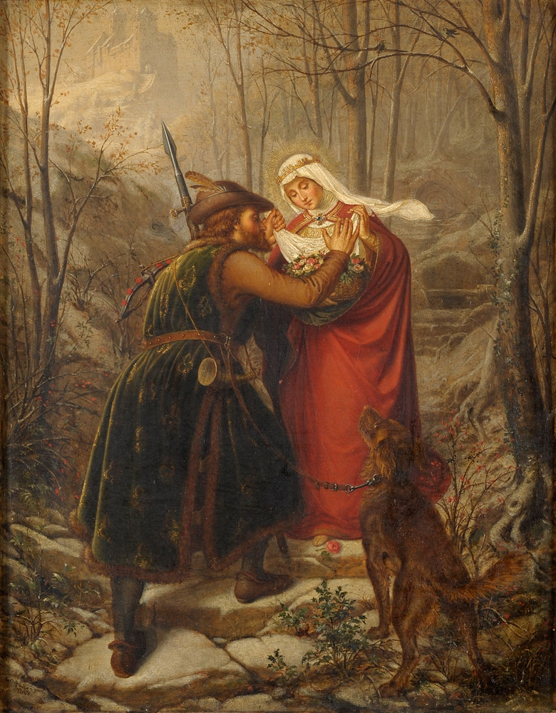 Rosenwunder der hl. Elisabeth von Thüringen (beim Auktionshaus angeboten als „Begegnung der Edelleute“). Signiert. Datiert 1865. Öl auf Leinwand, 58 x 45 cm